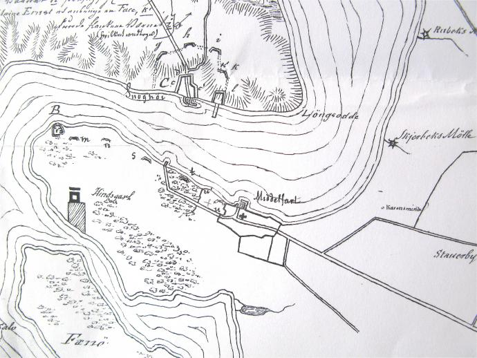 Kort skitse fra 1848 af Hindgavl befæstningsanlæg på begge sider af Lillebælt produceret af Christian Julius de Meza.